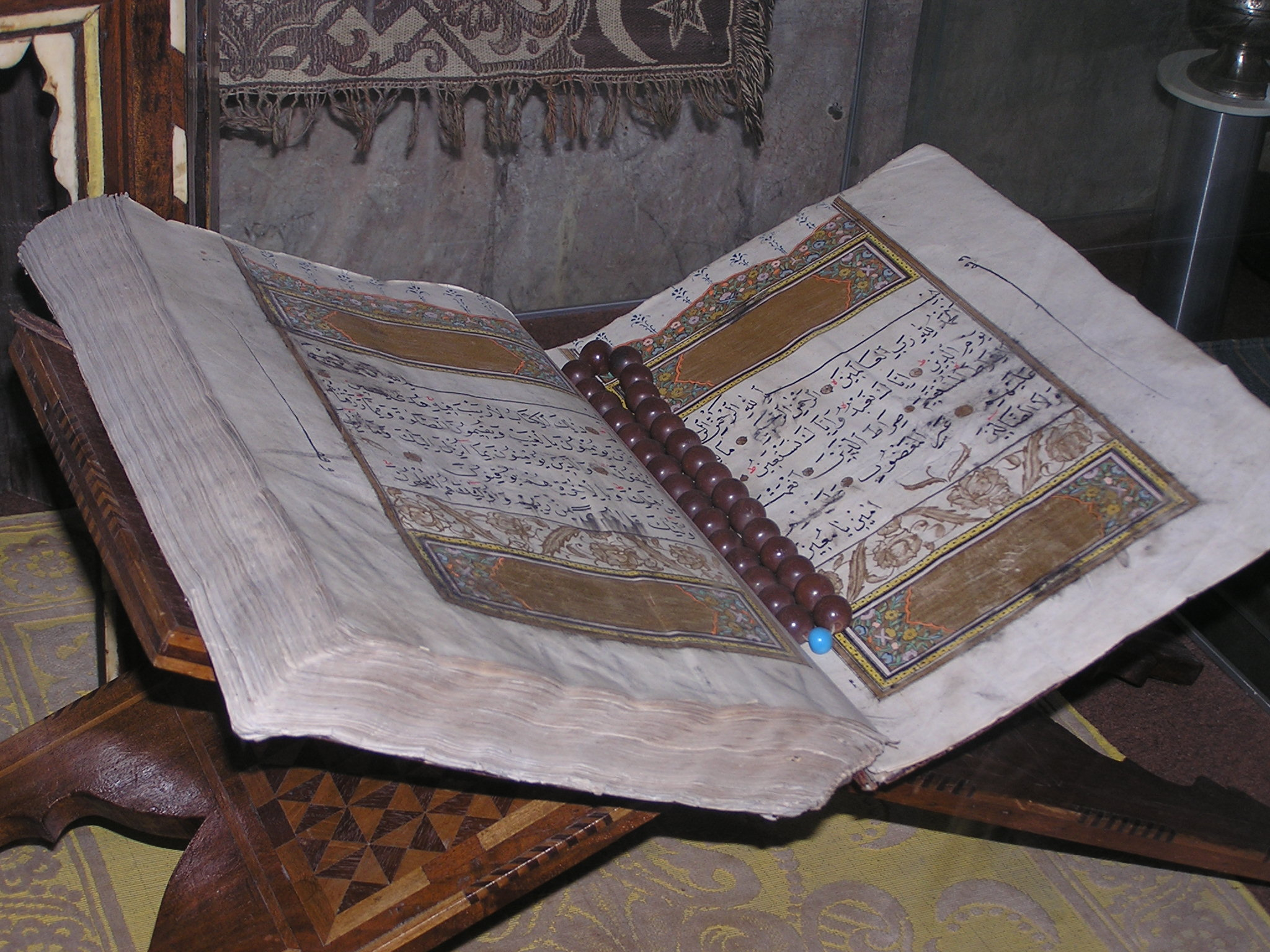 Коран